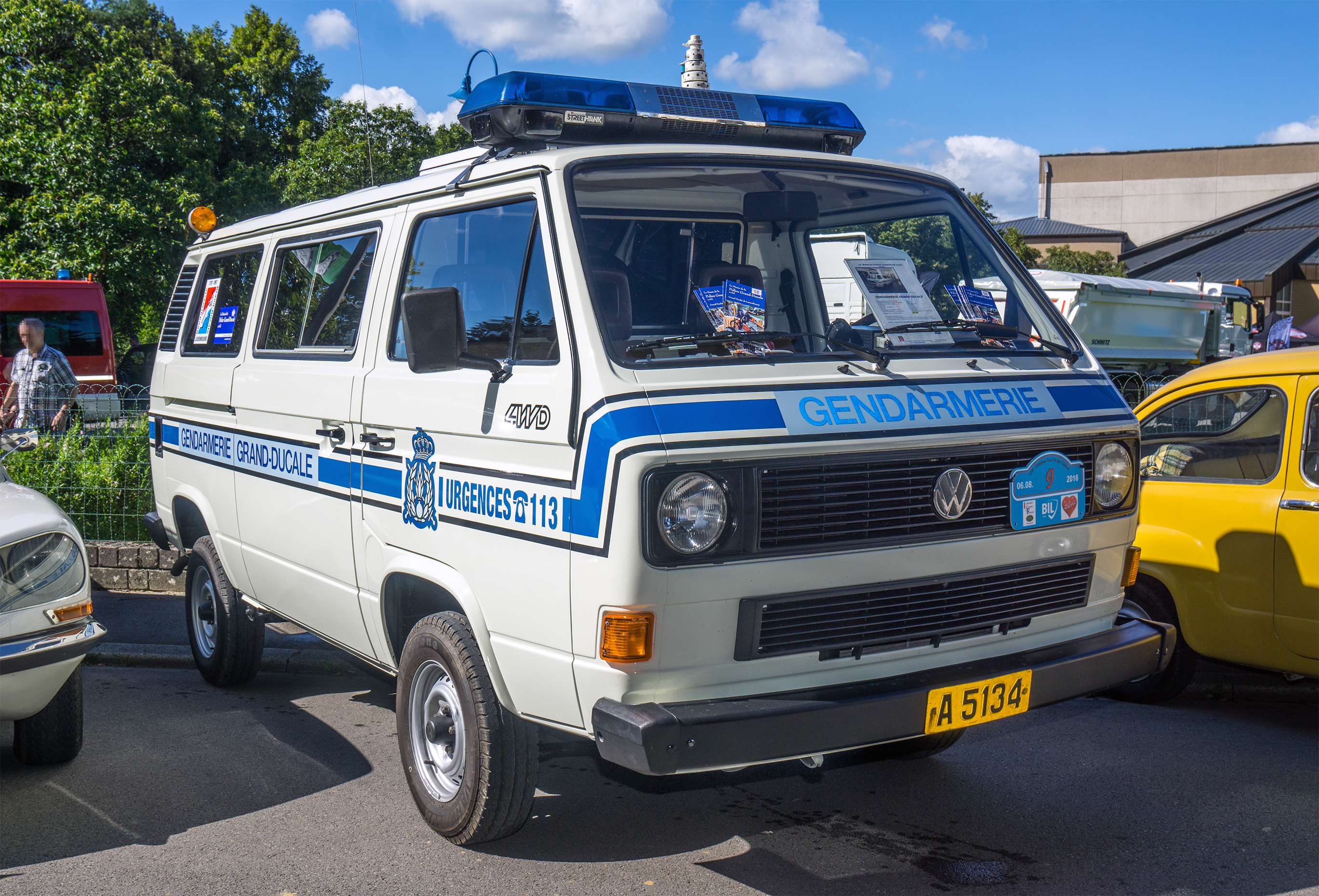 VW T3 syncro 1991 vun der Gendarmerie Lëtzebuerg aus dem Musée vun der Police, ausgestallt op der Vintage Cars & Bikes zu Stengefort